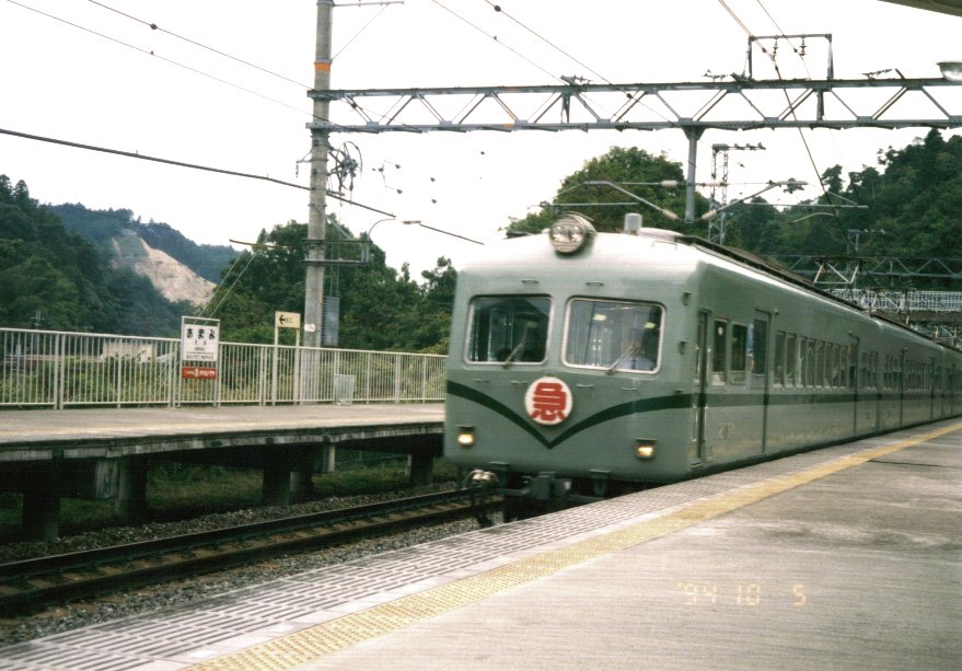 現役当時のja:南海21000系電車 旧塗色 天見にて